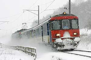 Eisenbahn S41 im Schnee